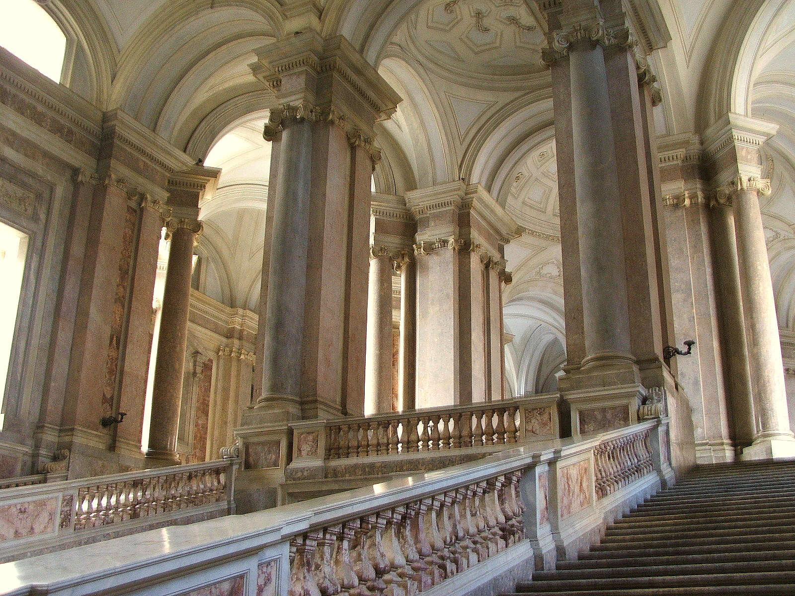 Caserta, Reggia di Caserta - Scalone Reale